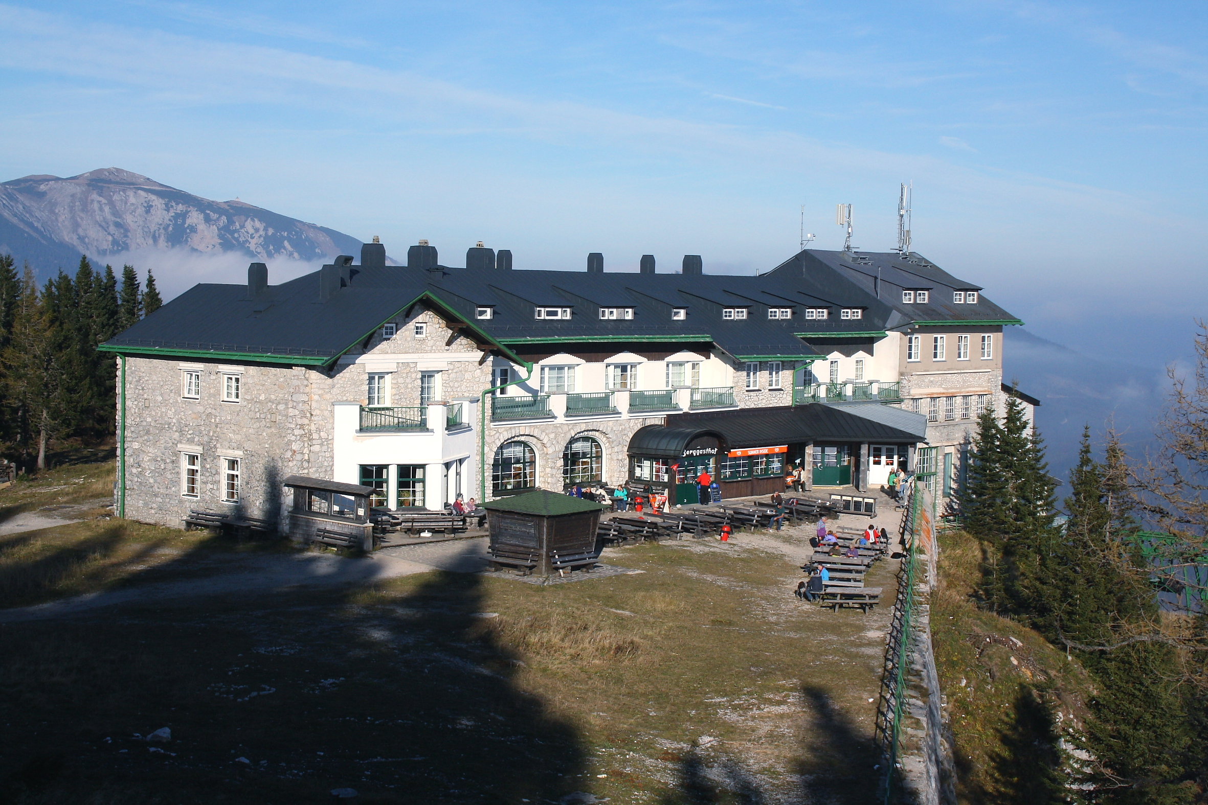 Südwestansicht des Raxalpen-Berggasthofes und die Bergstation der Raxseilbahn. Links hinten der 1888 m hohe Waxriegel, ein Gipfel des Schneebergmassivs.